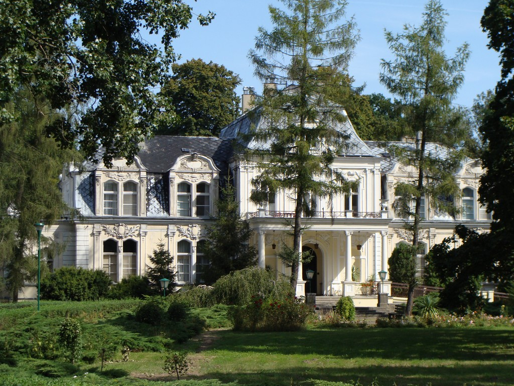 Błociszewo, pałac